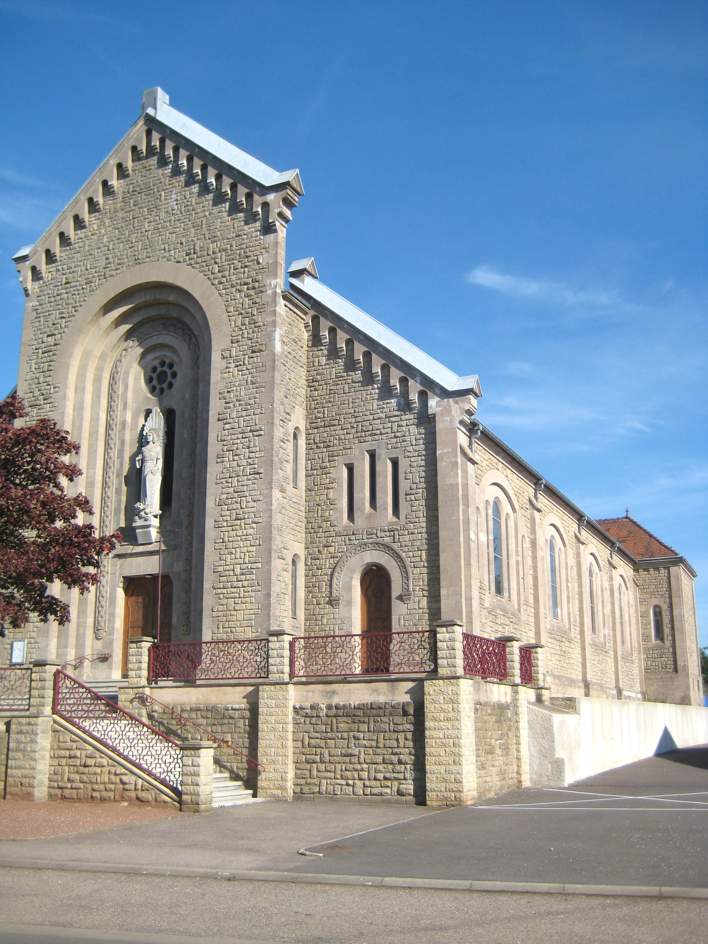 Description nouvelle eglise Angevillers Date12 August 2011Sourcemon appareil photoAuthorAimelaimePermission (Reusing this file) nouvelle eglise Angevillers